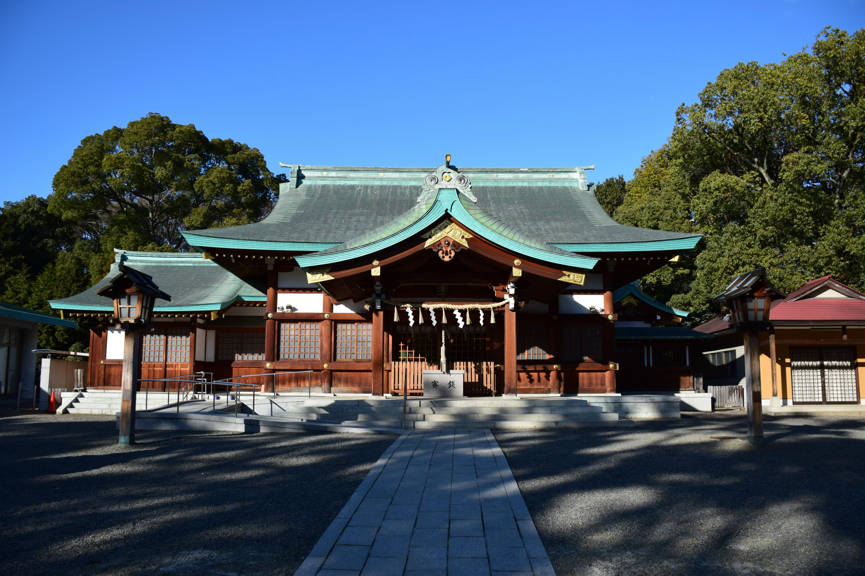 川原神社拝殿